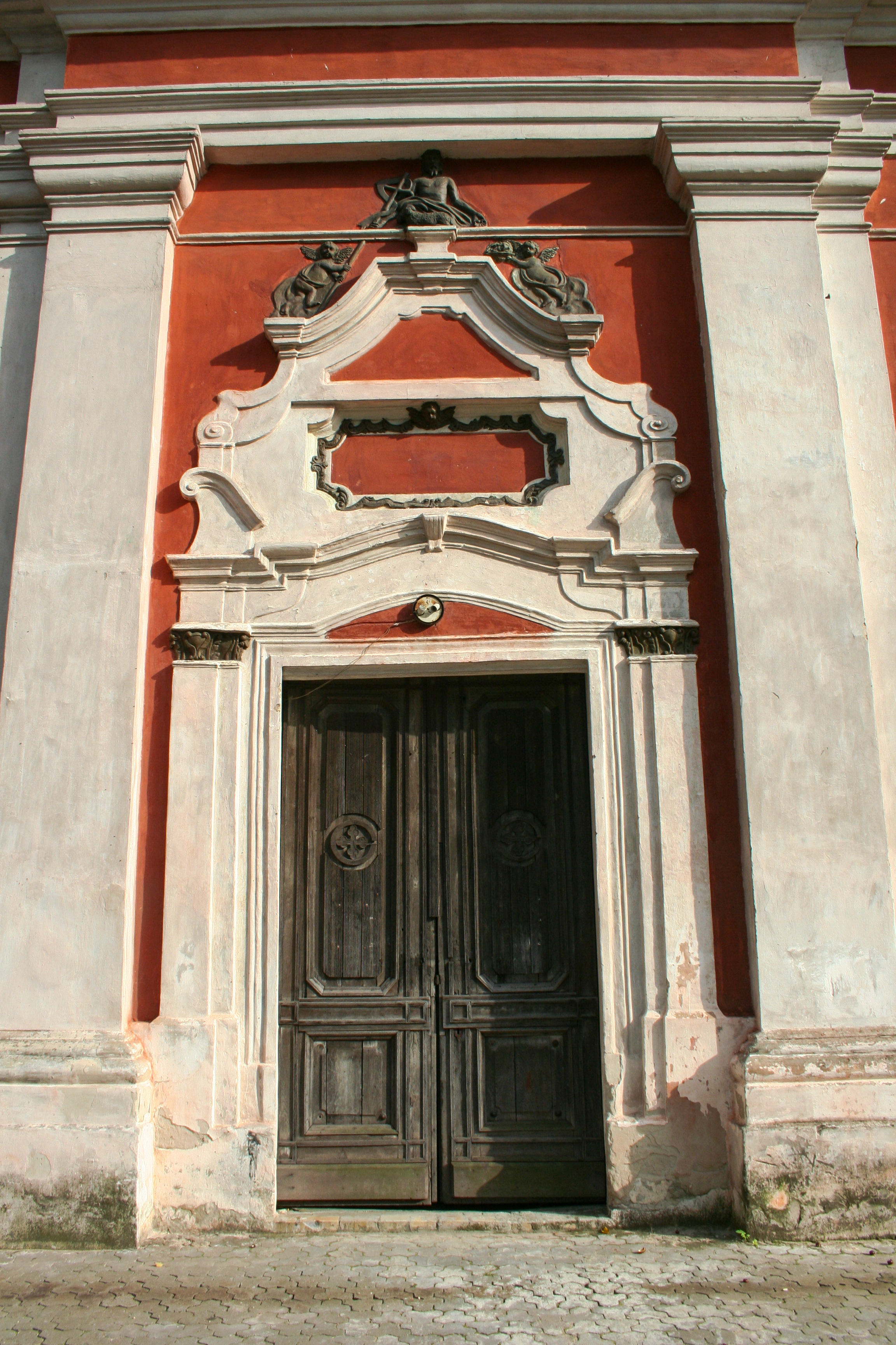 Костел Іоанна Хрестителя (мур.), Дубровиця, вул.Воробинська